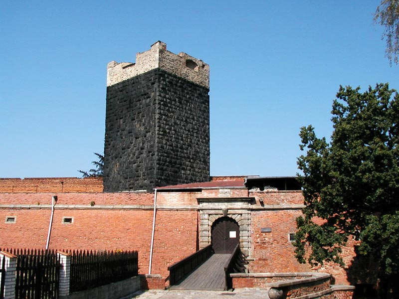 Cheb hrad